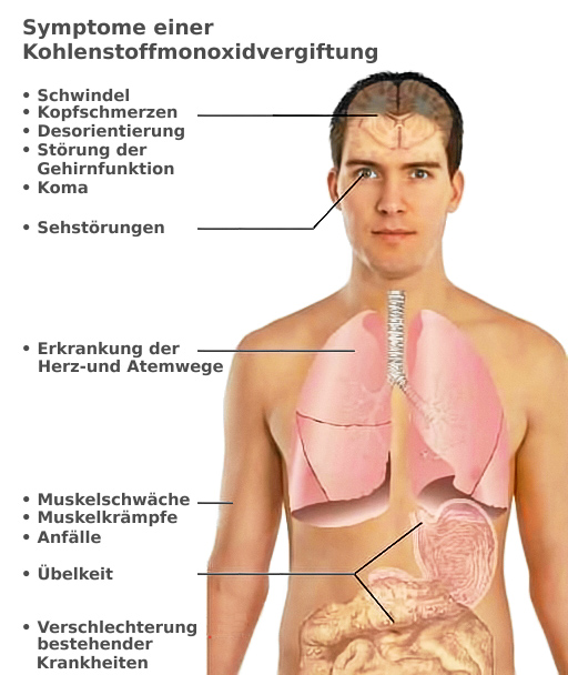 Symptome einer Kohlenmonoxidvergiftung